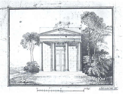 sketch Pomonatempel (Potsdam, Germany)